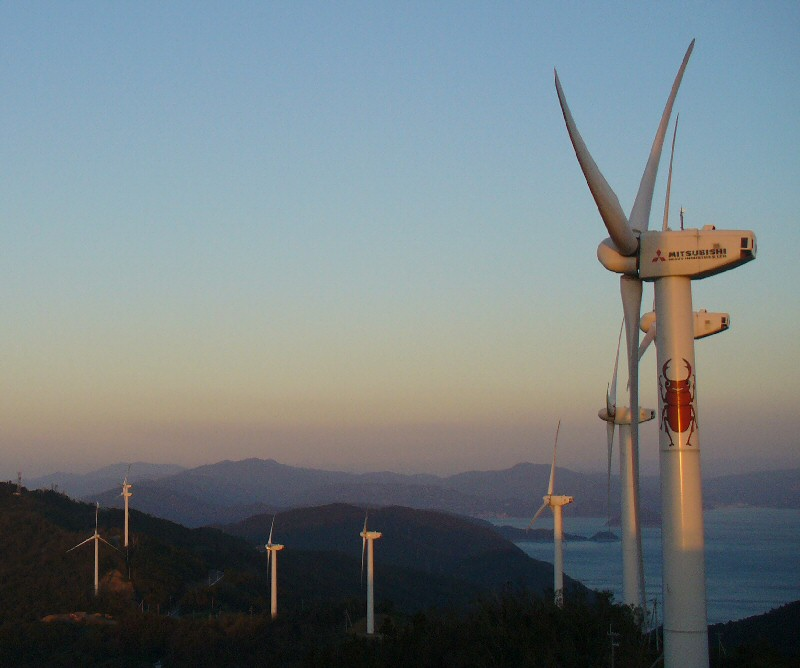 せと風の丘パークからの眺め。 2005年10月19日、利用者:Muramasaによる撮影。